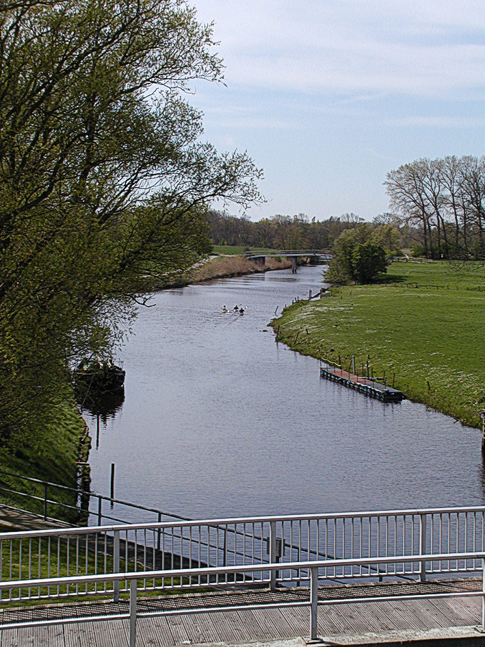 Die Medem kurz vor der Schleuse